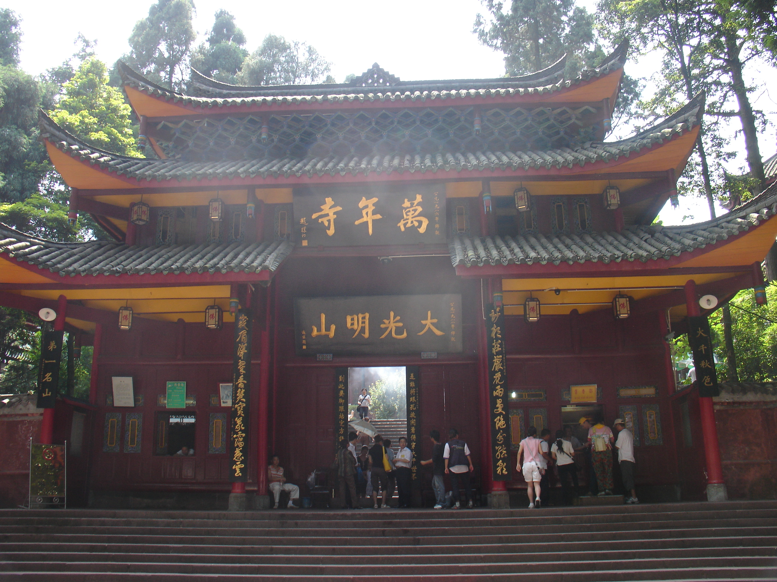 2006 峨眉山 万年寺